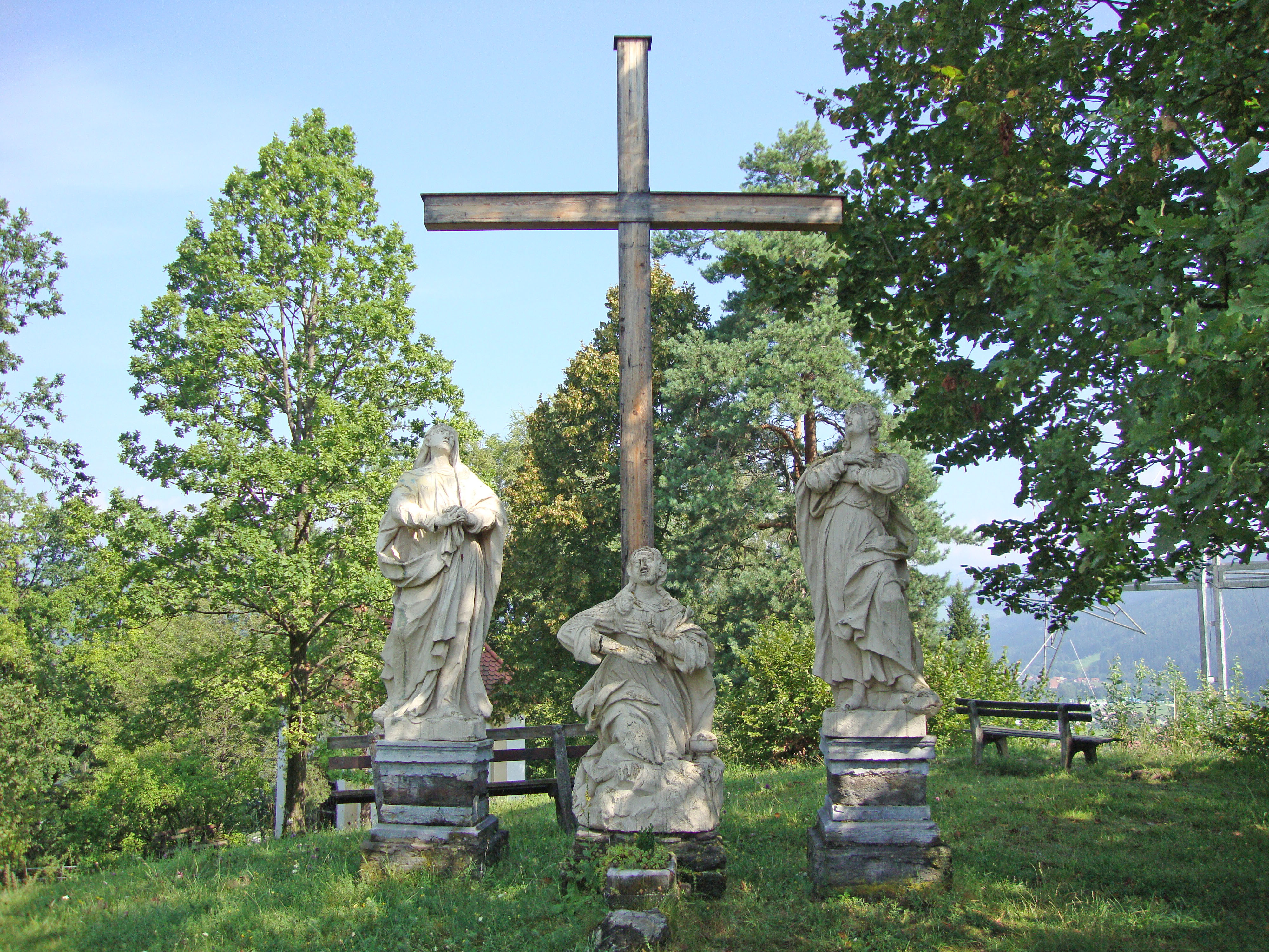 Heiliger Berg Karmel mit Kirche, Kloster, Kreuzweg und Hl.-Grab-Kapelle